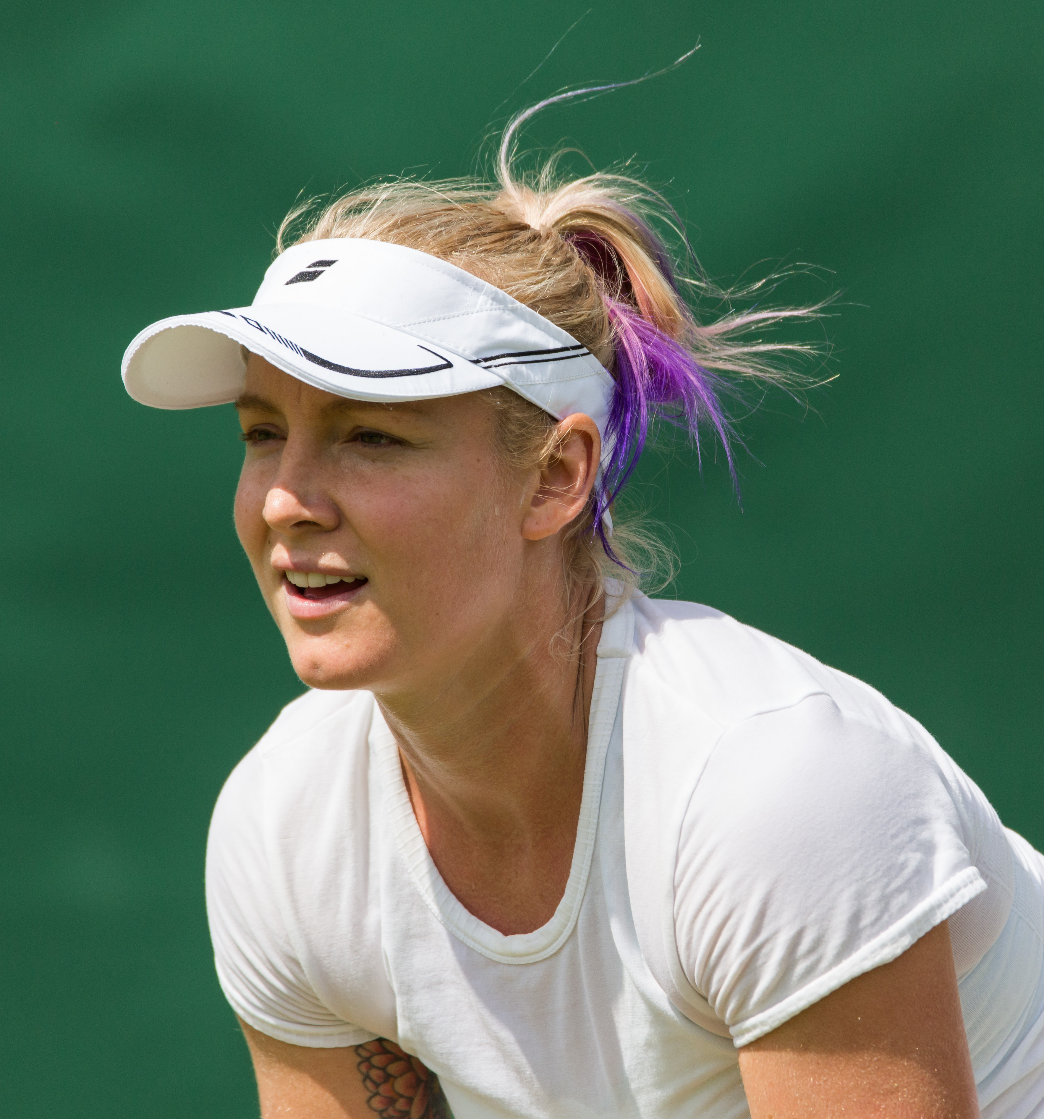 Bethanie Mattek-Sands